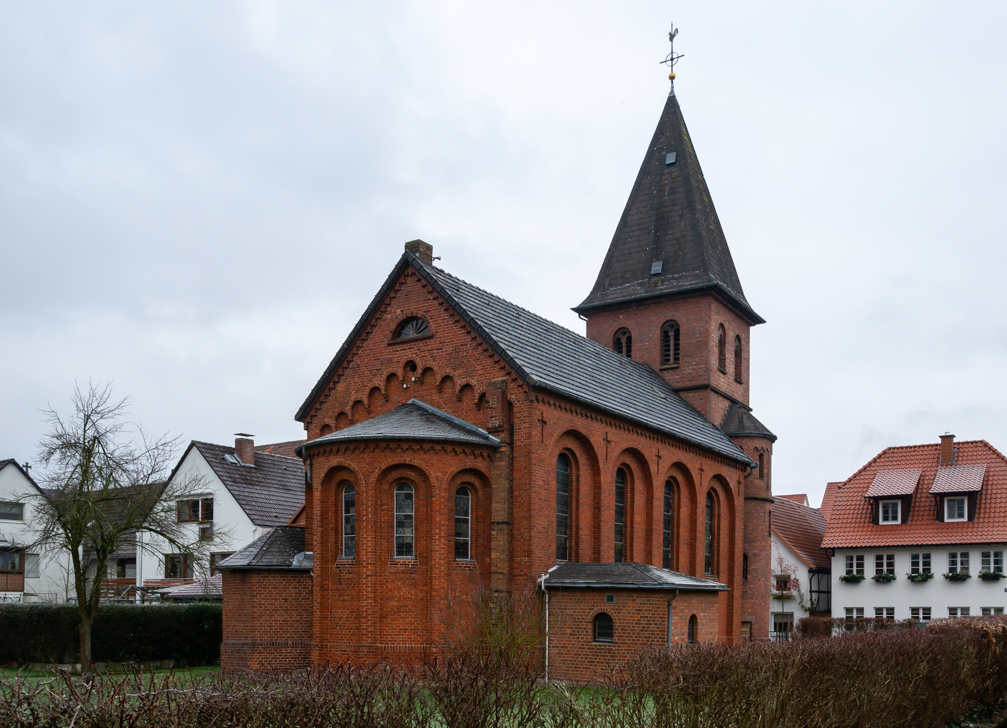 This is a photograph of an architectural monument. Evangelische Kirche "St. Johannis"